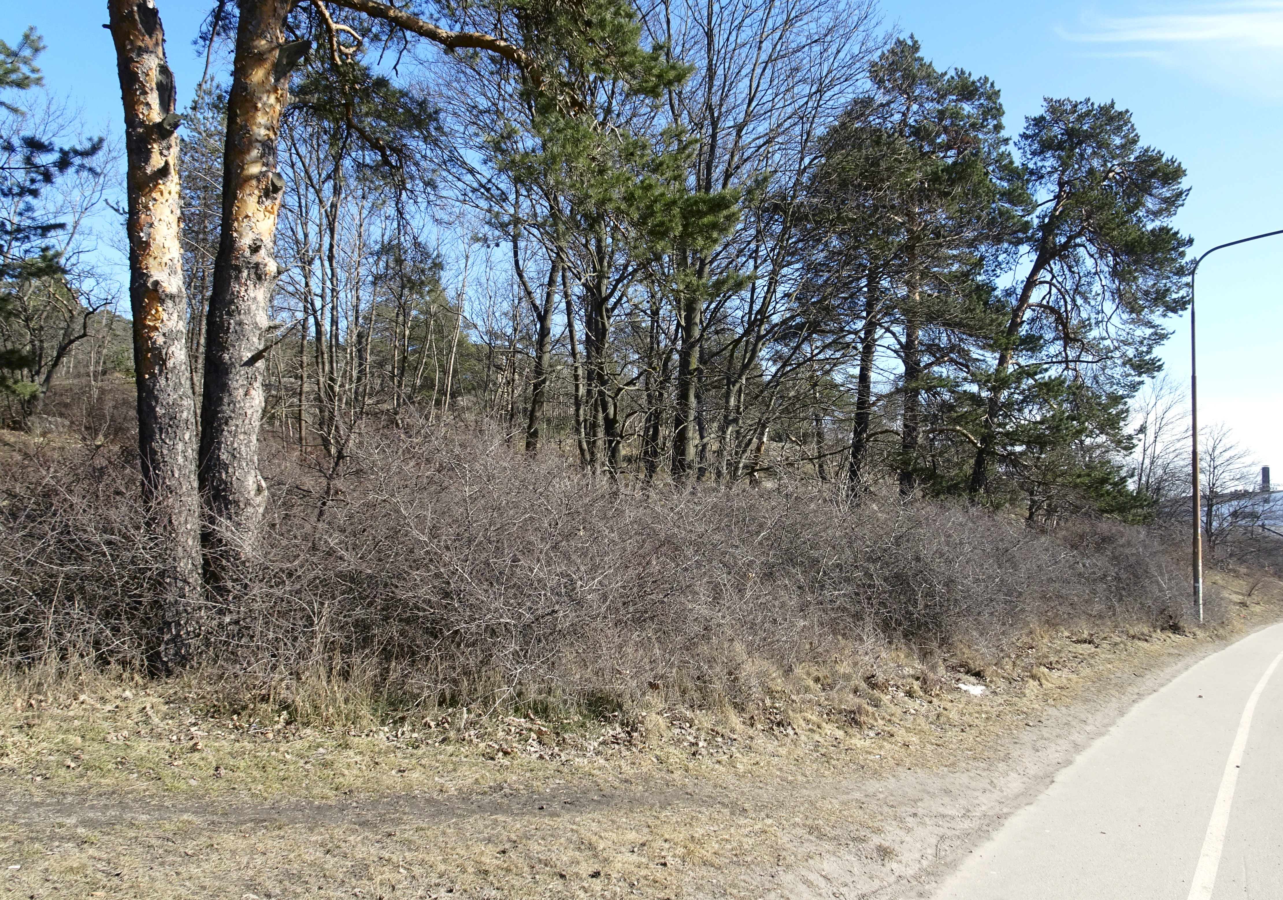 Zachrisbergs gamla tomt, Årstaberg, t.h.syns Årstabergsvägen